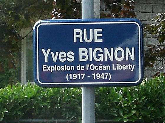 Nouvelle plaque de la rue Yves Bignon, Brest, France. Par décision du 14/12/2010